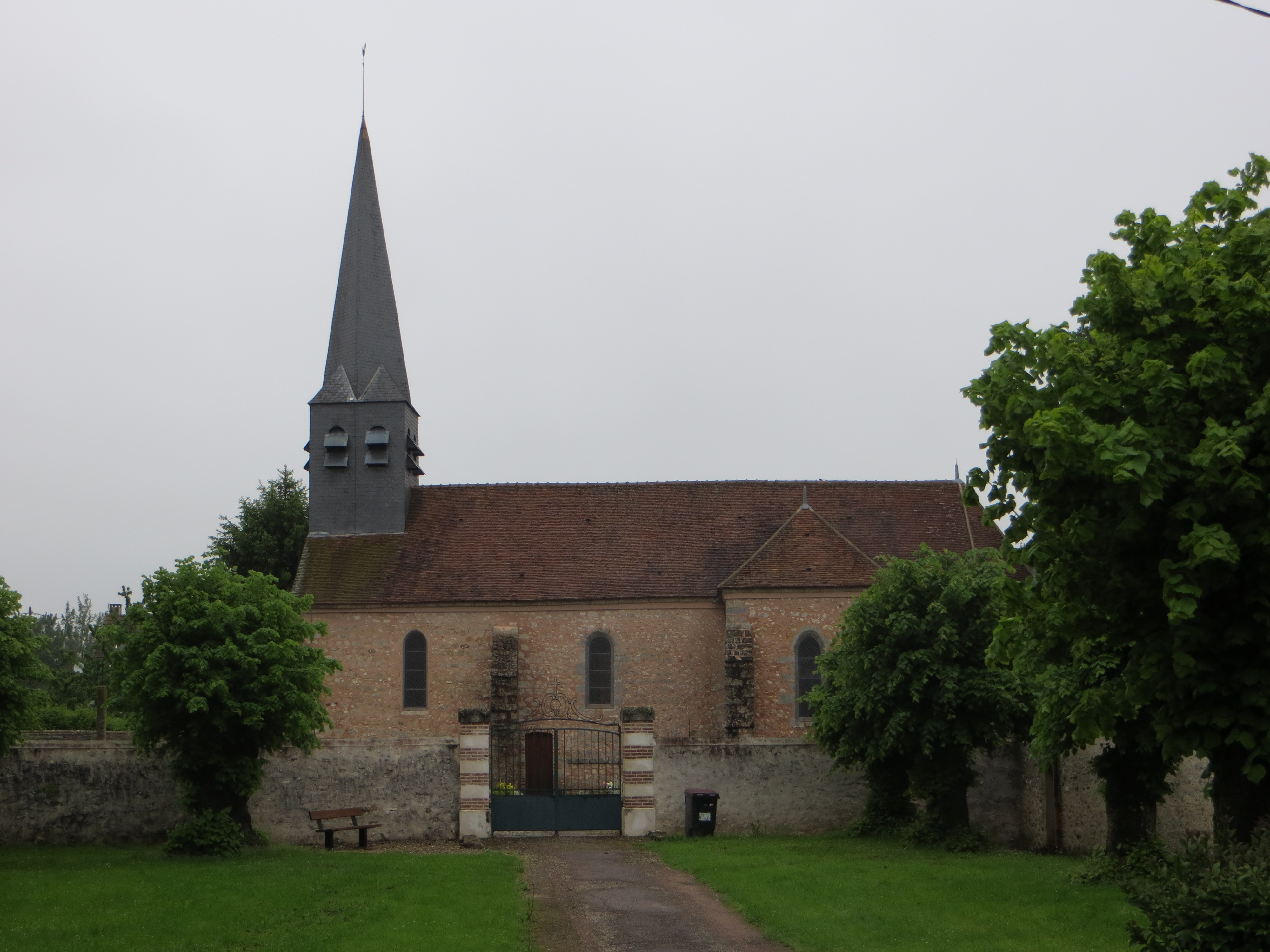 Vue générale de l'église